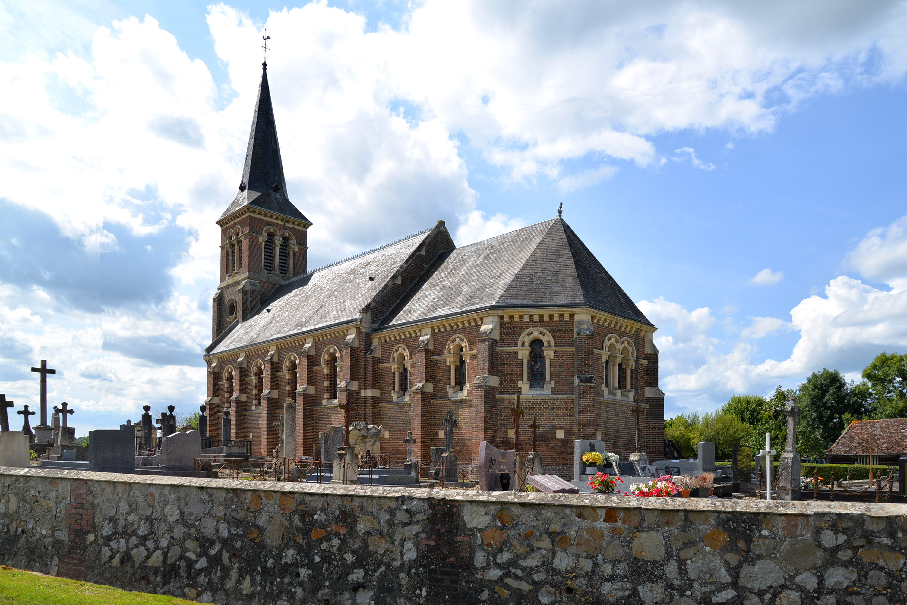 Rumesnil (Calvados)